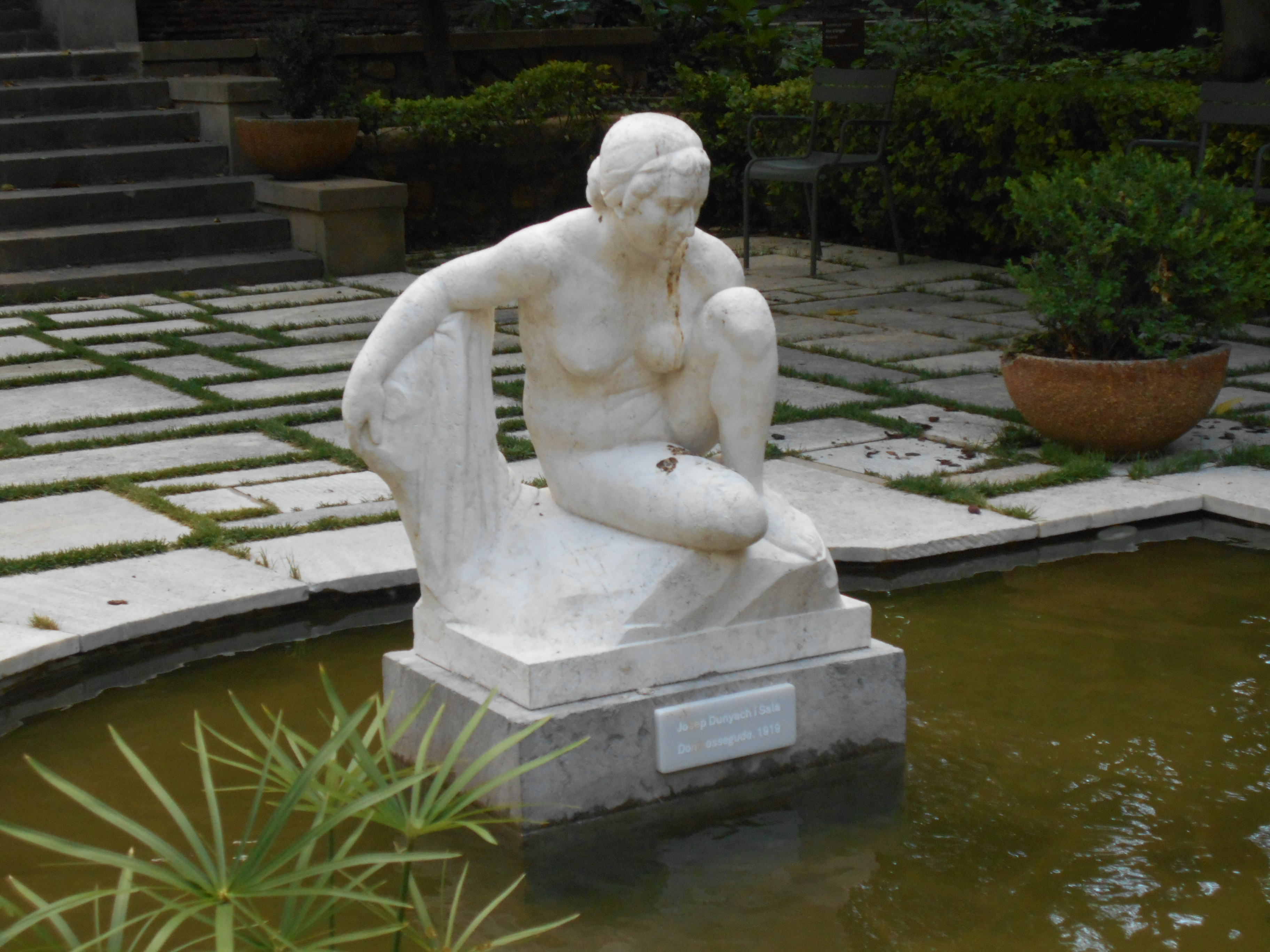 Jardín de la Fundación Julio Muñoz Ramonet: Mujer sentada, de Josep Dunyach, 1919.